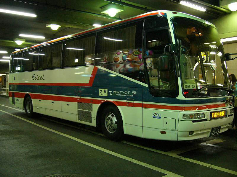 登録番号 習志野22を29-13 京成バス所属 夜行用車両 （各系統で共通運用） 2005年9月17日 阪急三番街にて撮影